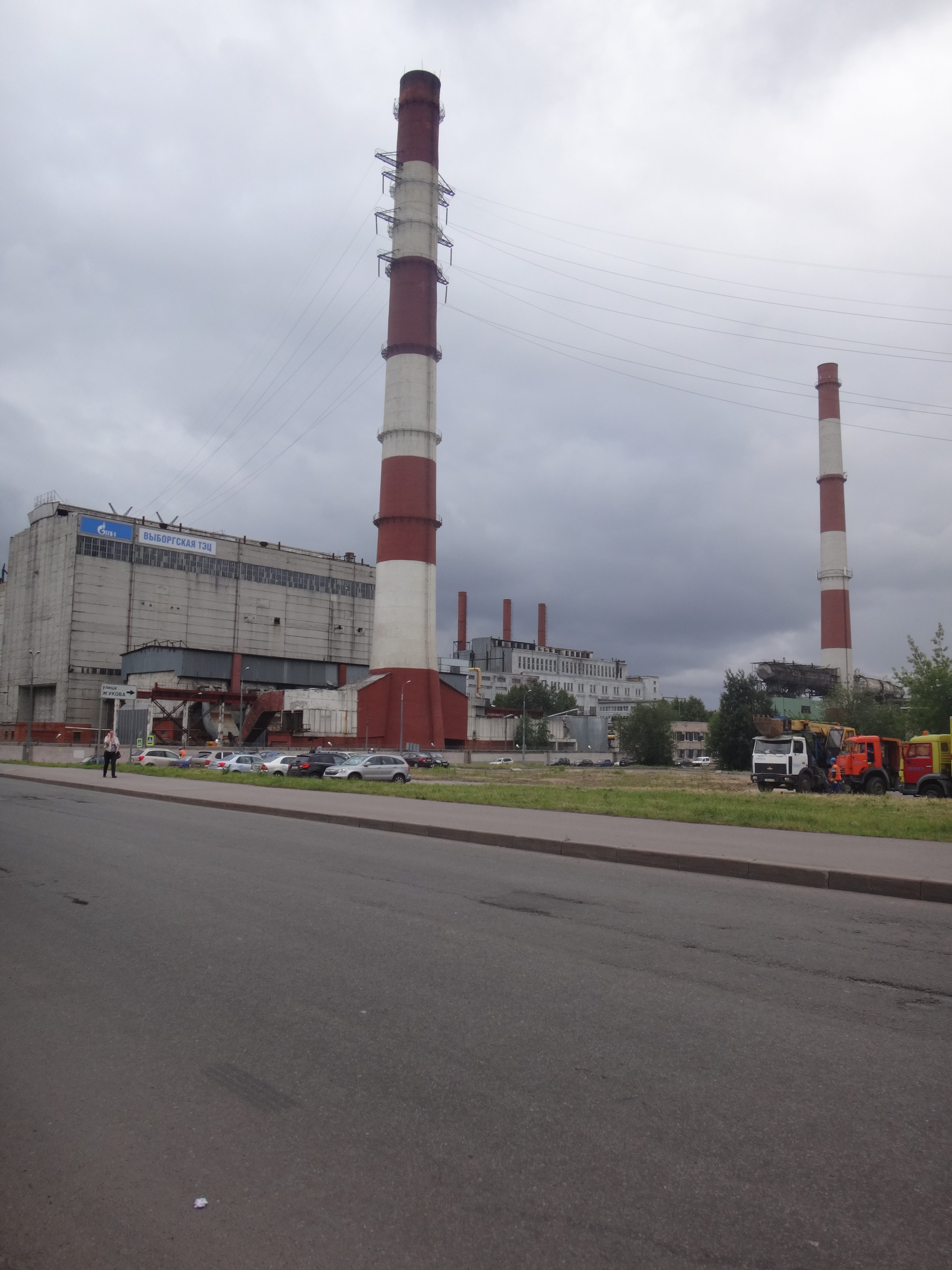 Выборгская ТЭЦ или просто ТЭЦ-17